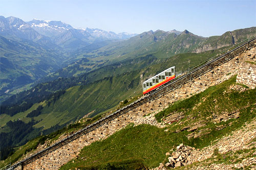 Niesenbahn